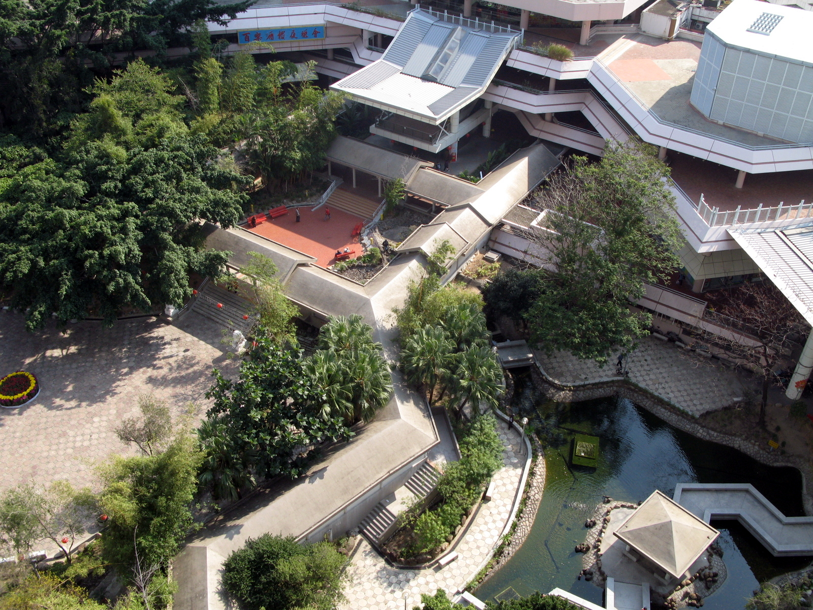 Heng On Estate Garden